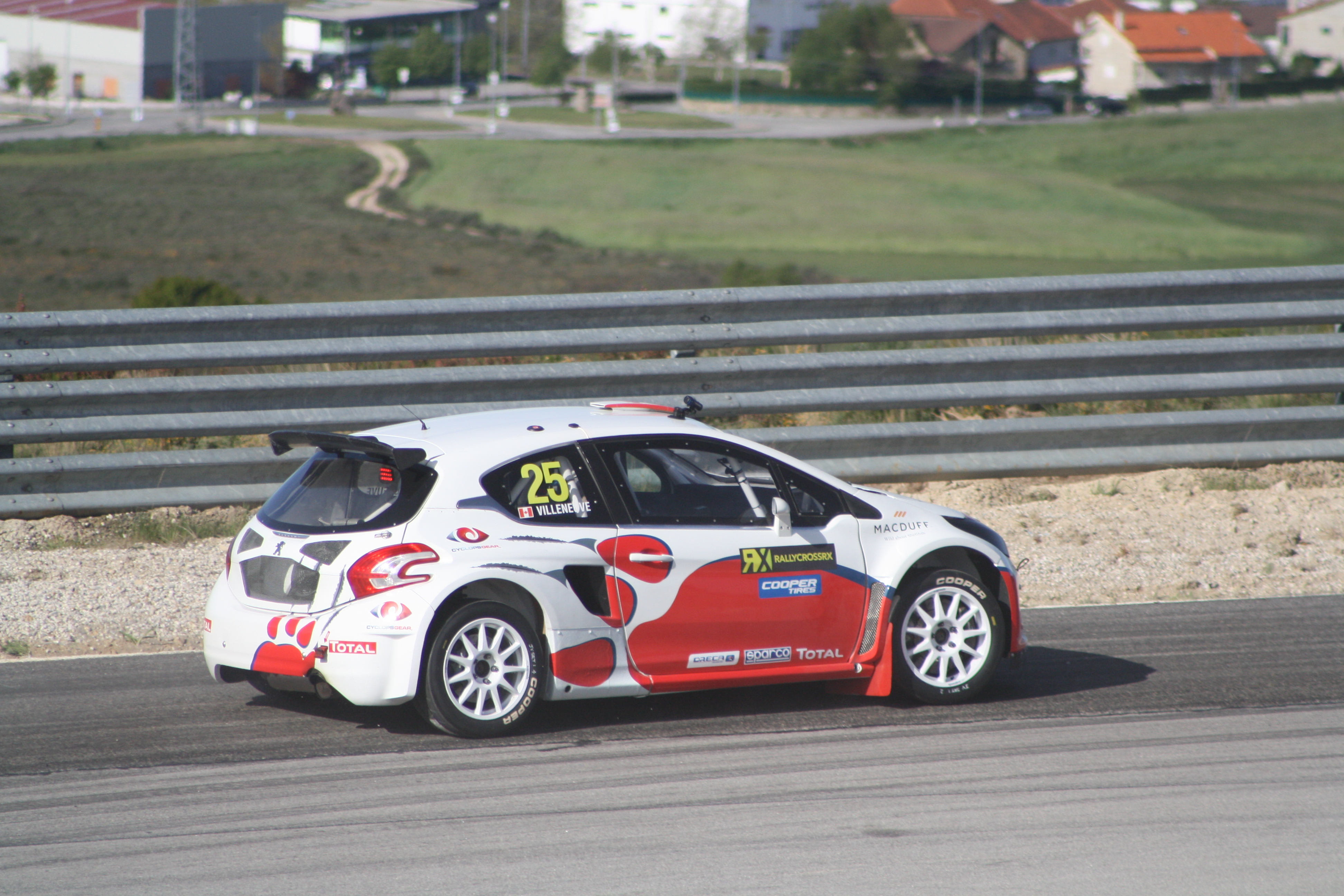 Jacques Villeneuve en Portugal la primera ronda del Campeonato del Mundo de Rallycross.